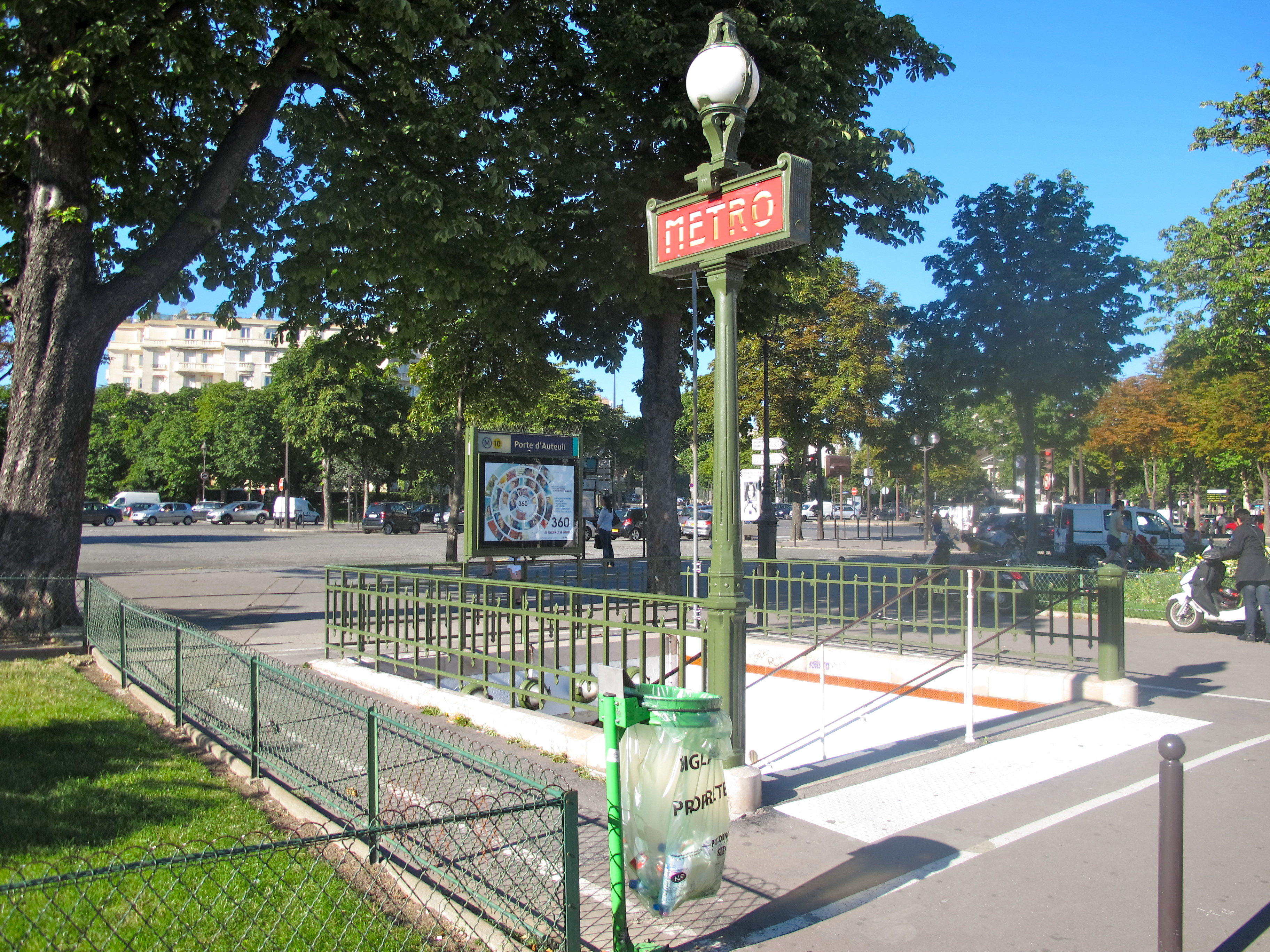 Une des entrées de la station de métro porte d'Auteuil avec candélabre Dervaux (Paris).